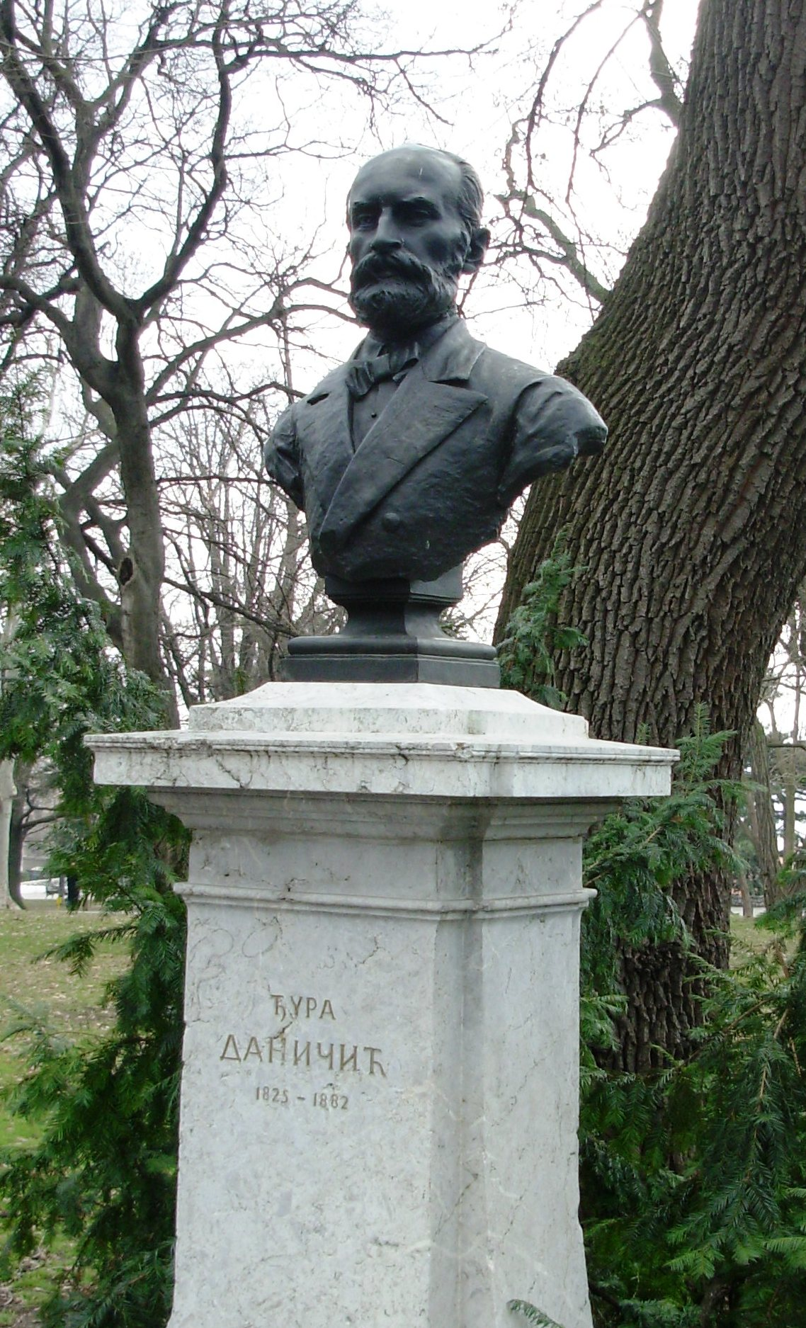 Đura Daničić, bista na Kalimegdanu, Beograd. Slikao Goldfinger